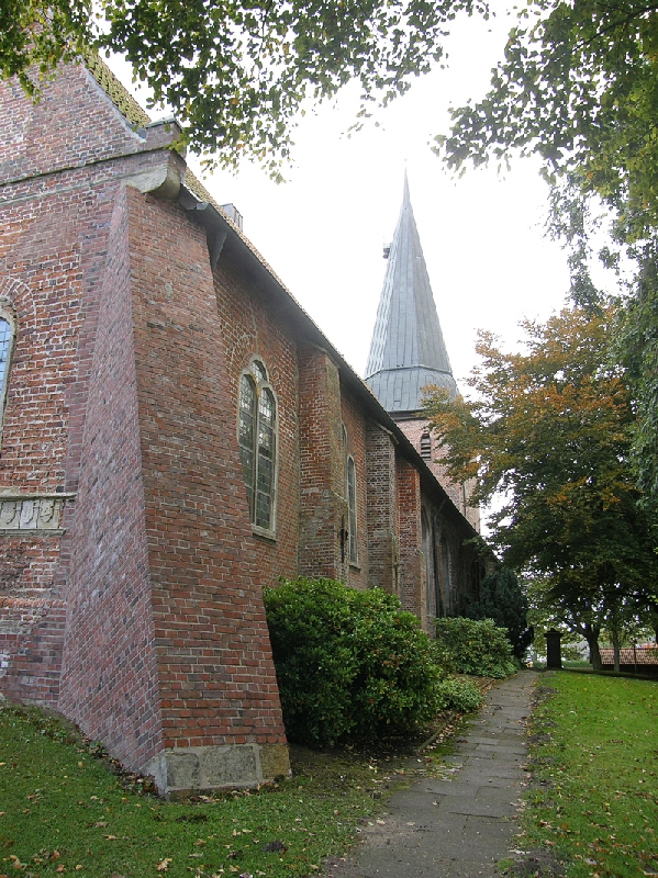 Die Kirche St. Jacobi in Cuxhaven Lüdingworth